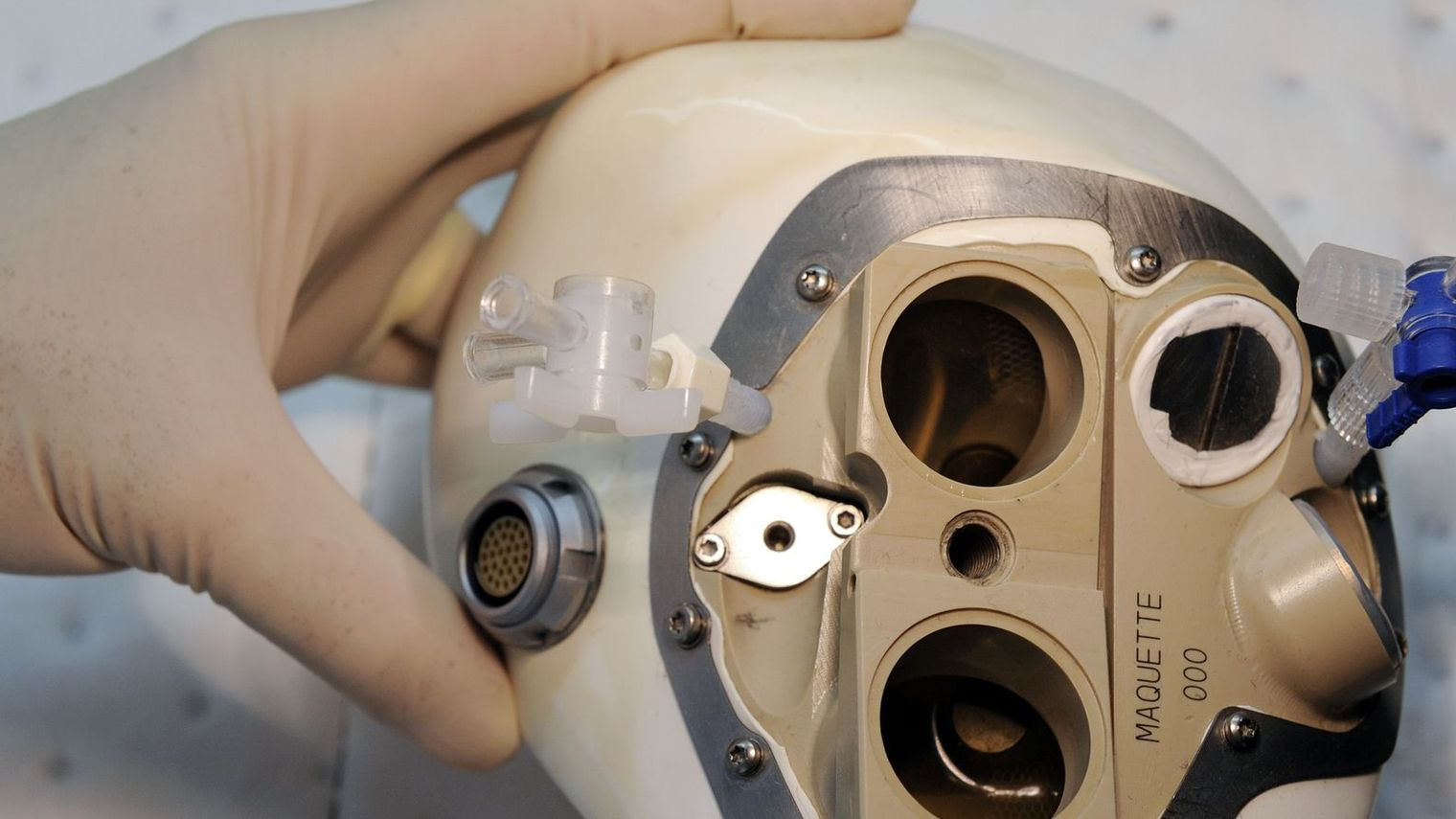 Coeur carmat